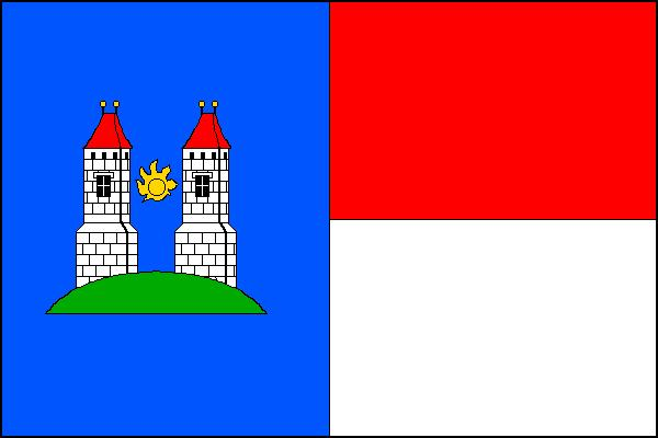 Vlajka obce Maršovice